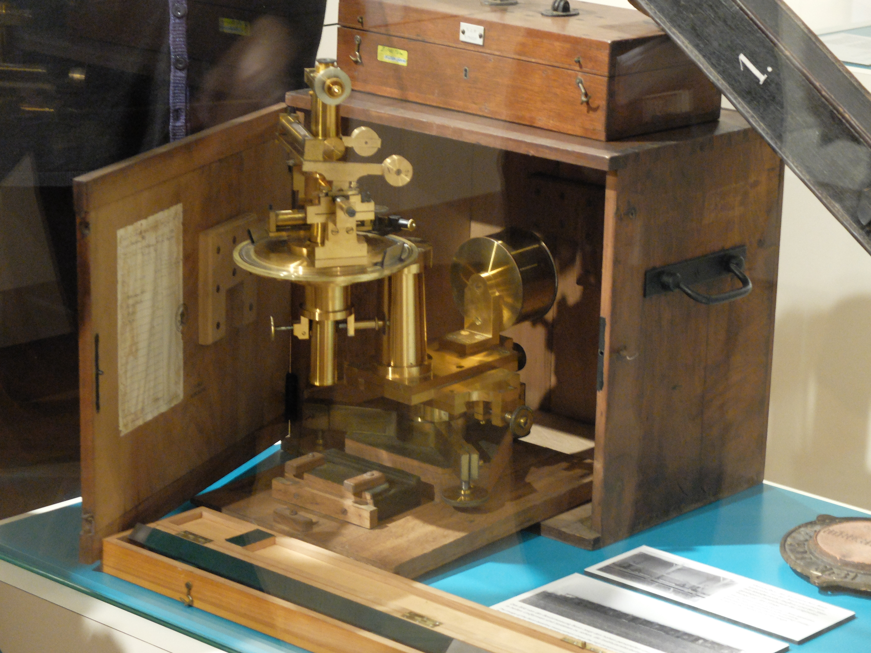 Basismikrometer (siehe [1]), Teil eines Brunner’schen Basisapparates von Carl Bamberg, um 1890 (Deutsches Geoforschungszentrum). Dazu gehören: 2 Basismikrometer mit Ablot, 1 Ablotfernrohr, 2 Stangenlager und eine 4 m lange Stange.